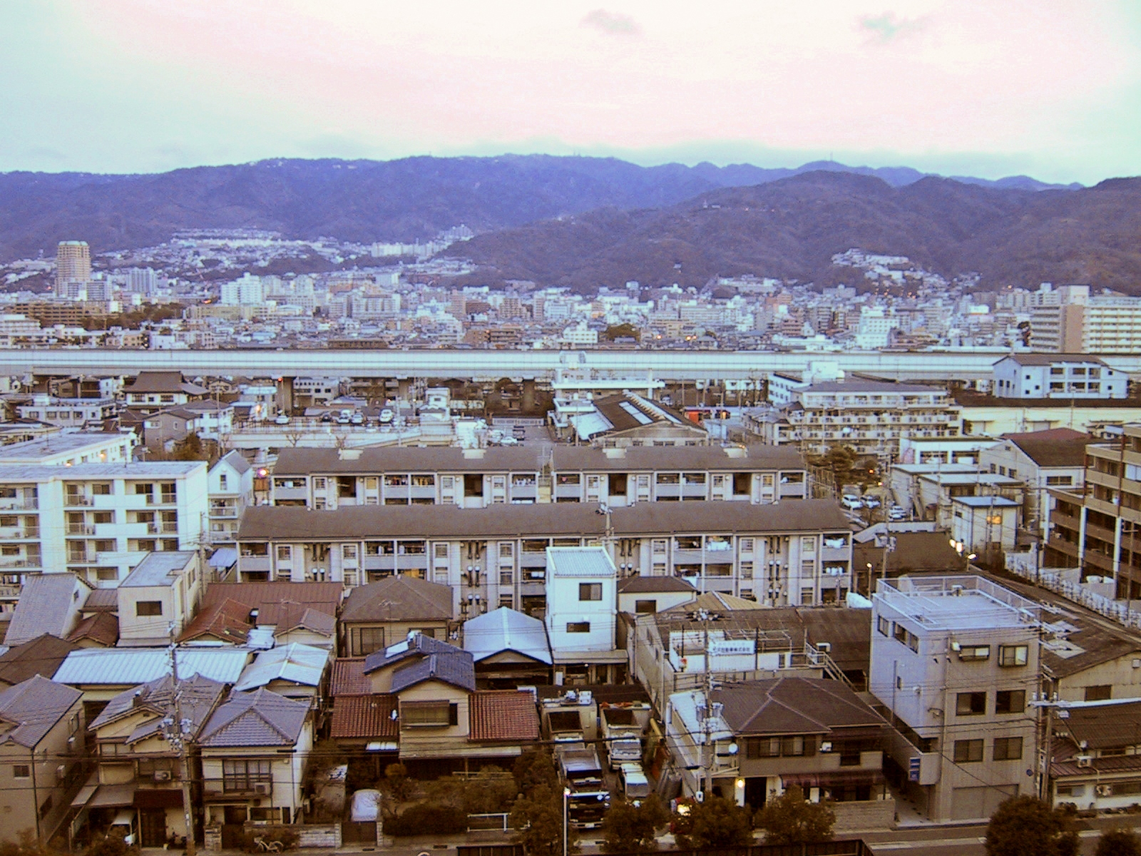 早朝の東灘区、Sionnachが2004年3月3日6時27分に撮影。